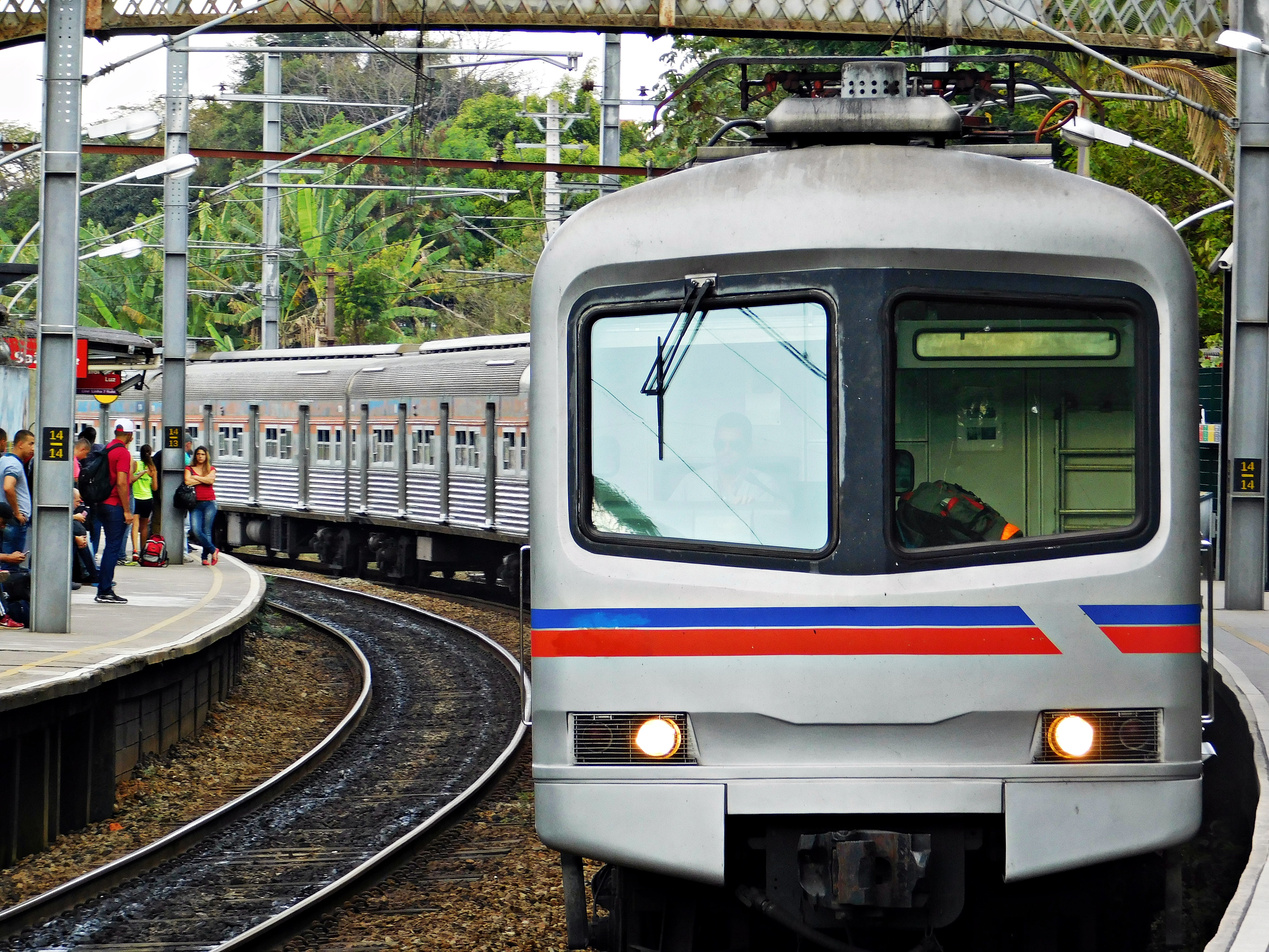 Composição 1121 em Vila Clarice sentido Francisco Morato